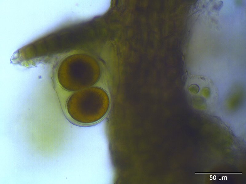 Spreizblättriges Kleinkopfsprossmoos (Cephaloziella divaricata), Brutkörper, Vergrößerung: 400x